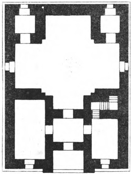 План усыпальницы матери и сына Хана